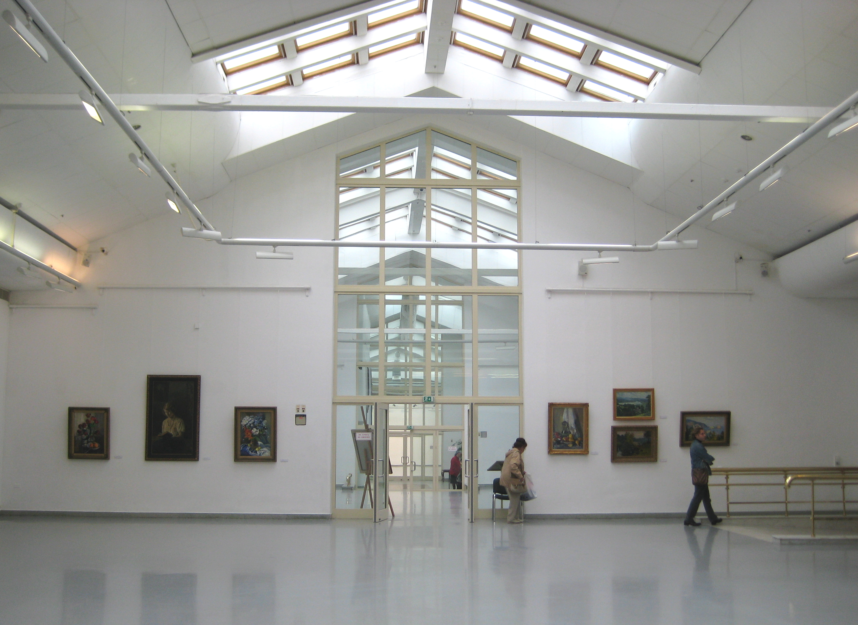 Новый Манеж. Интерьер. Выставка Налбандяна